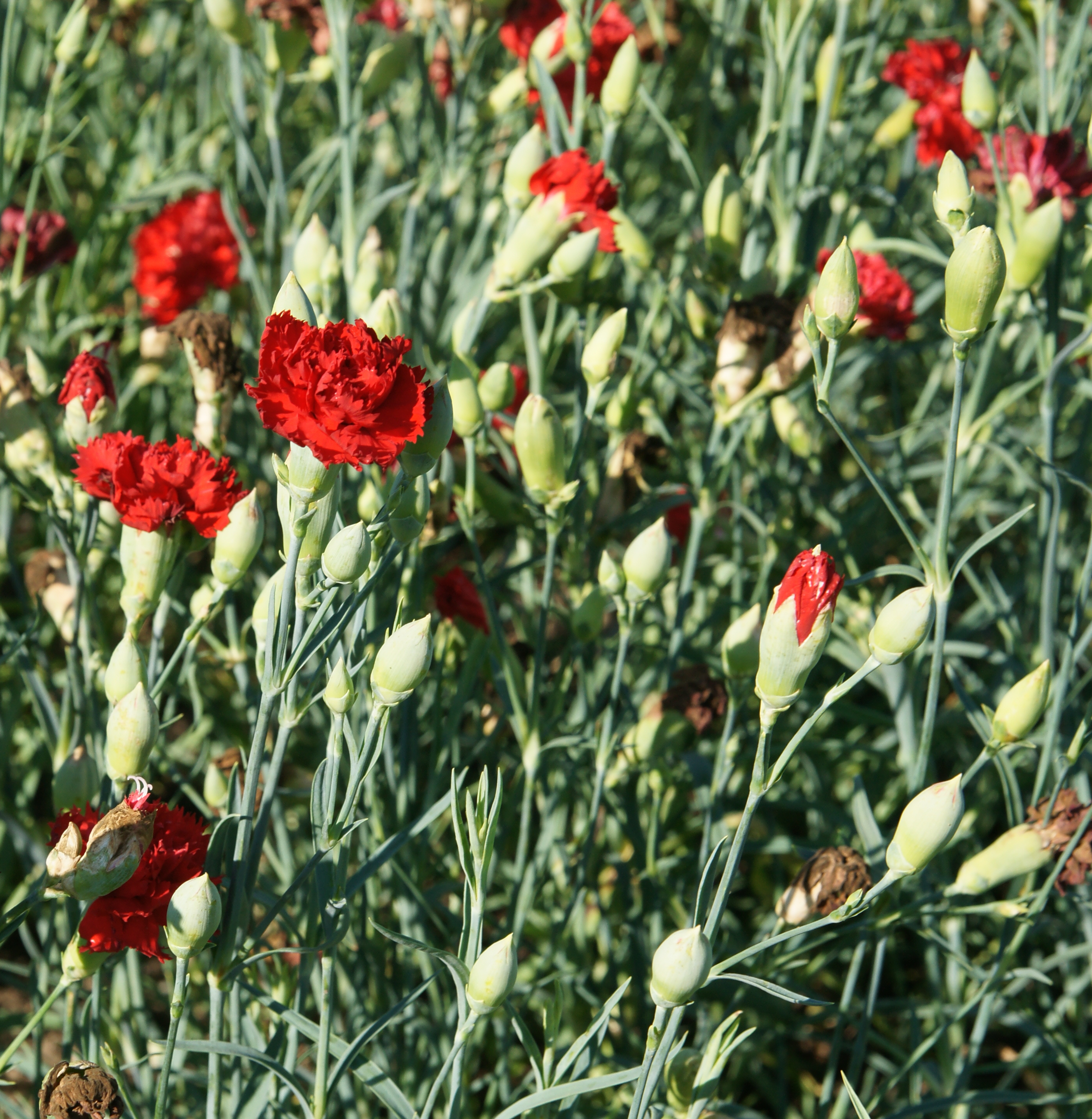 Dianthus caryophyllus Chabaud (Garten-Nelke) 'Etincelant'. Herkunft: Dittmar. ProSpecieRara-Zierpflanzengarten Elfenau Bern.